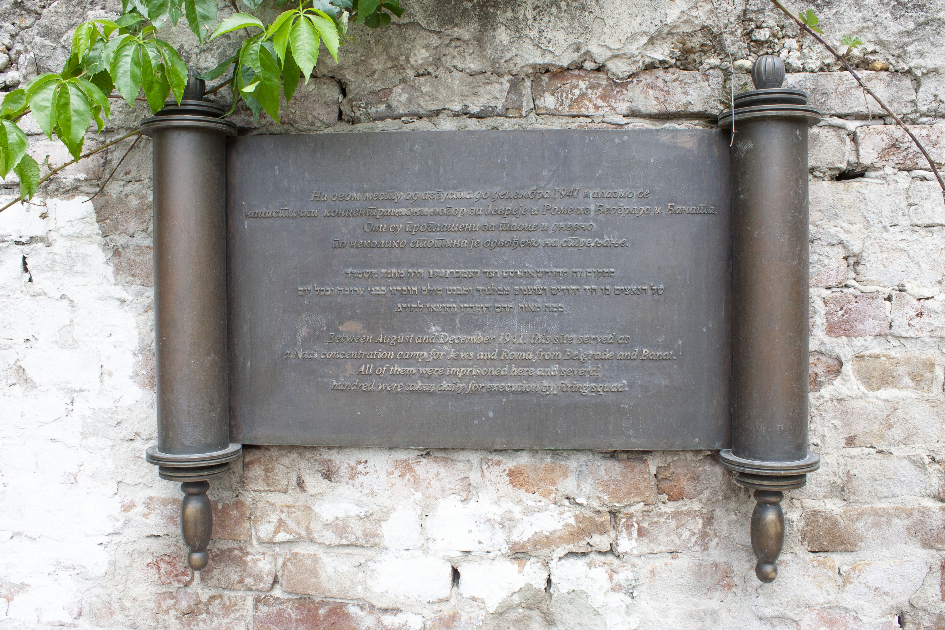 Спомен плоча логора Топовске шупе